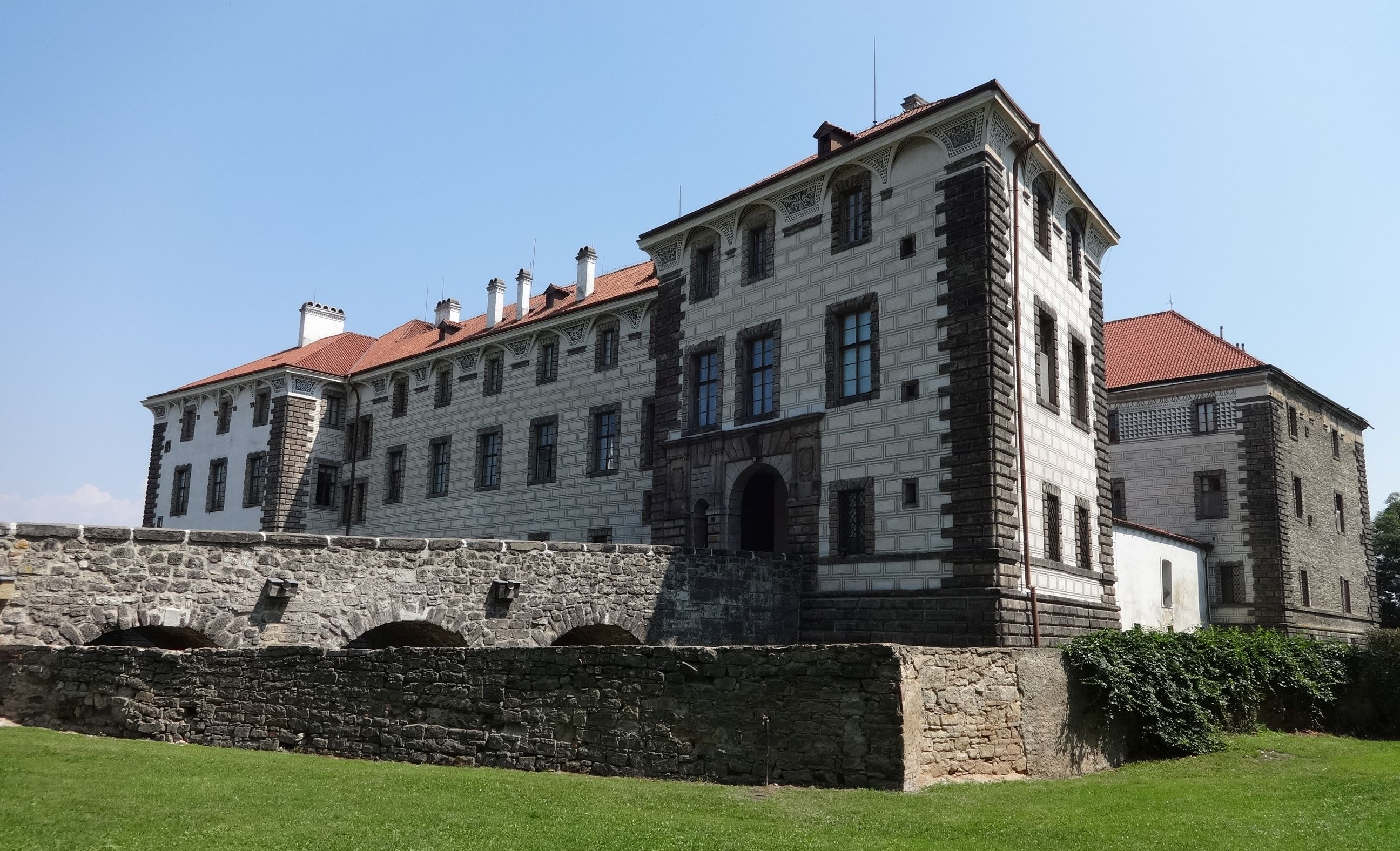 Eingang